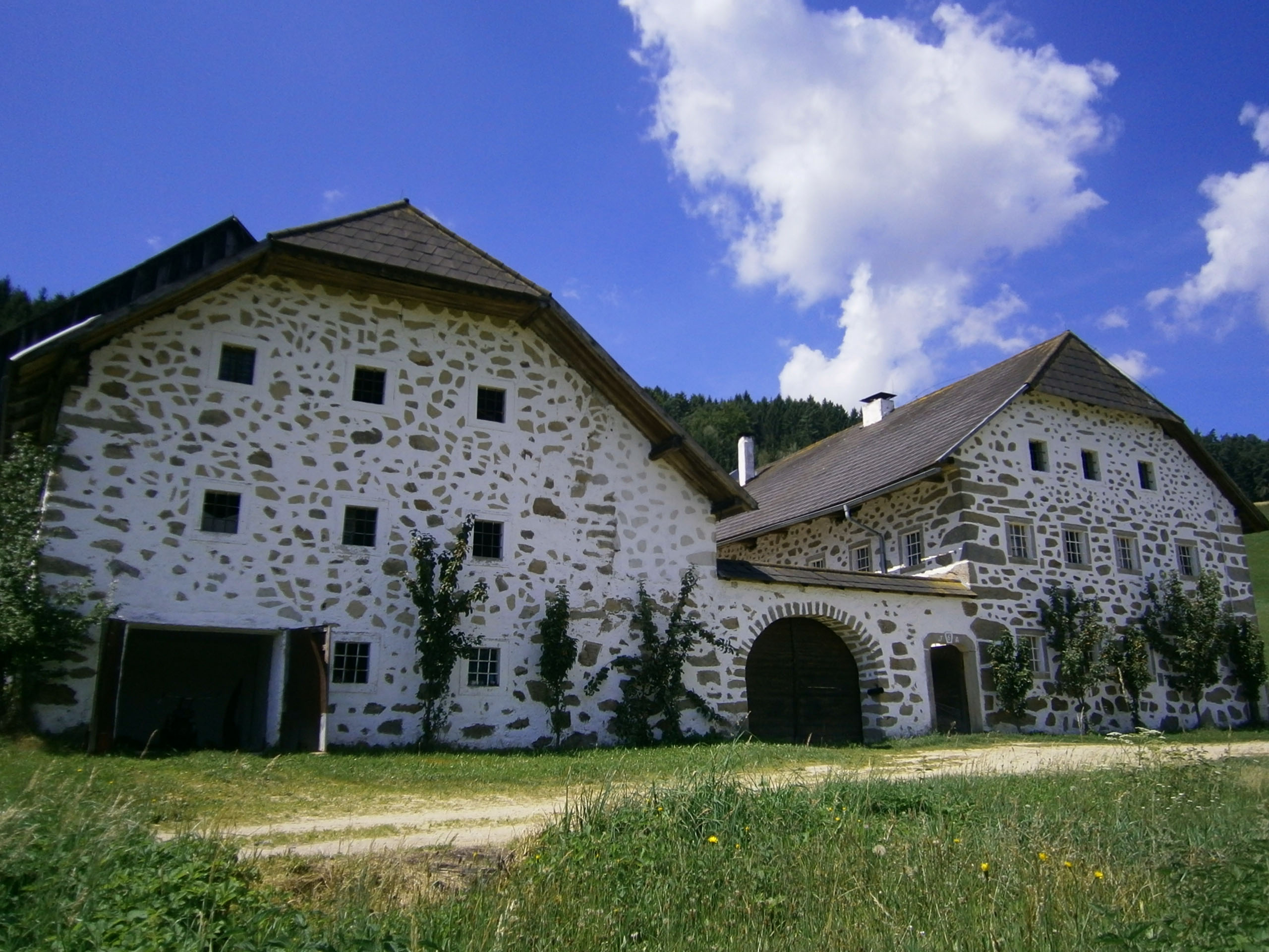 Bauernhof nahe der Ortschaft Stiftung, Gemeinde Neumarkt im Mühlkreis, Oberösterreich